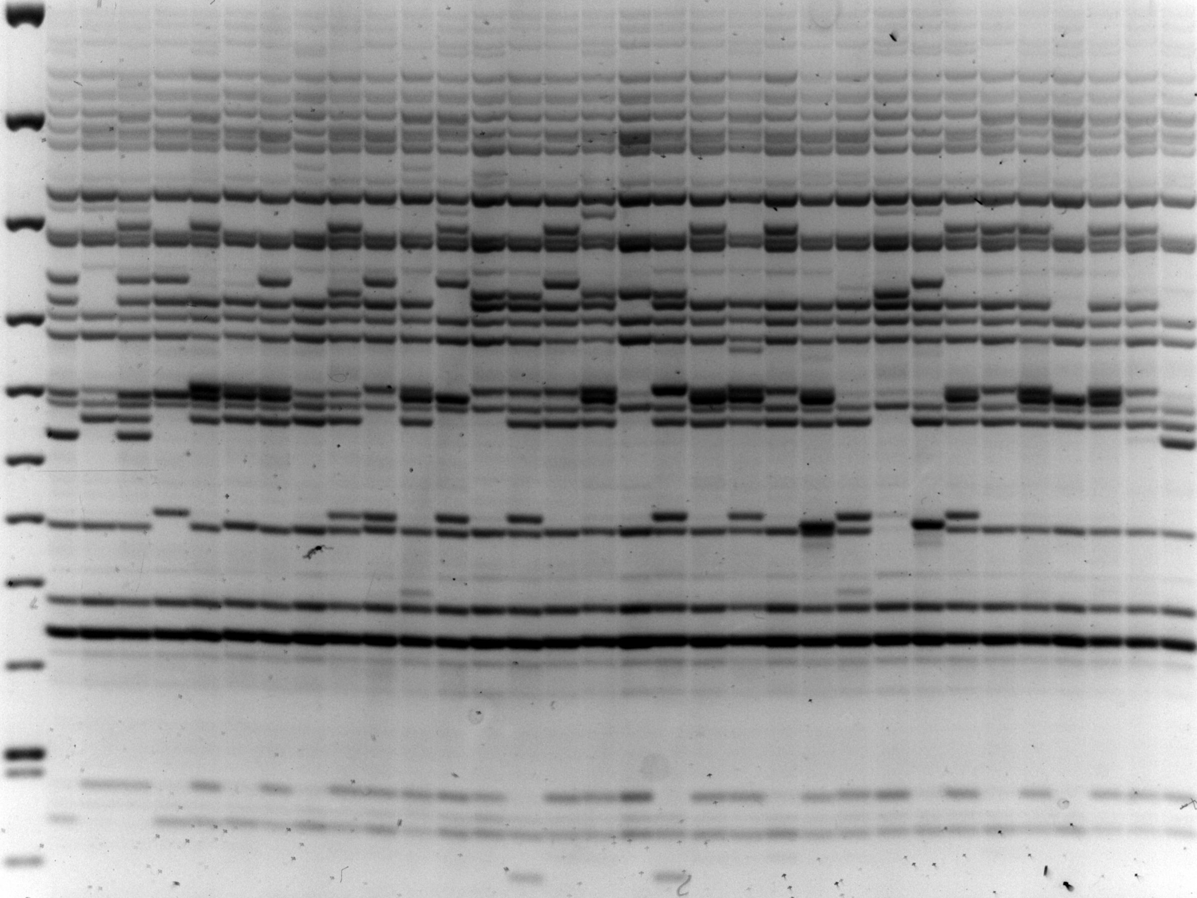 IRAP (Inter-Retrotransposon Amplified Polymorphism) PCR fingerprint for barley cultivars